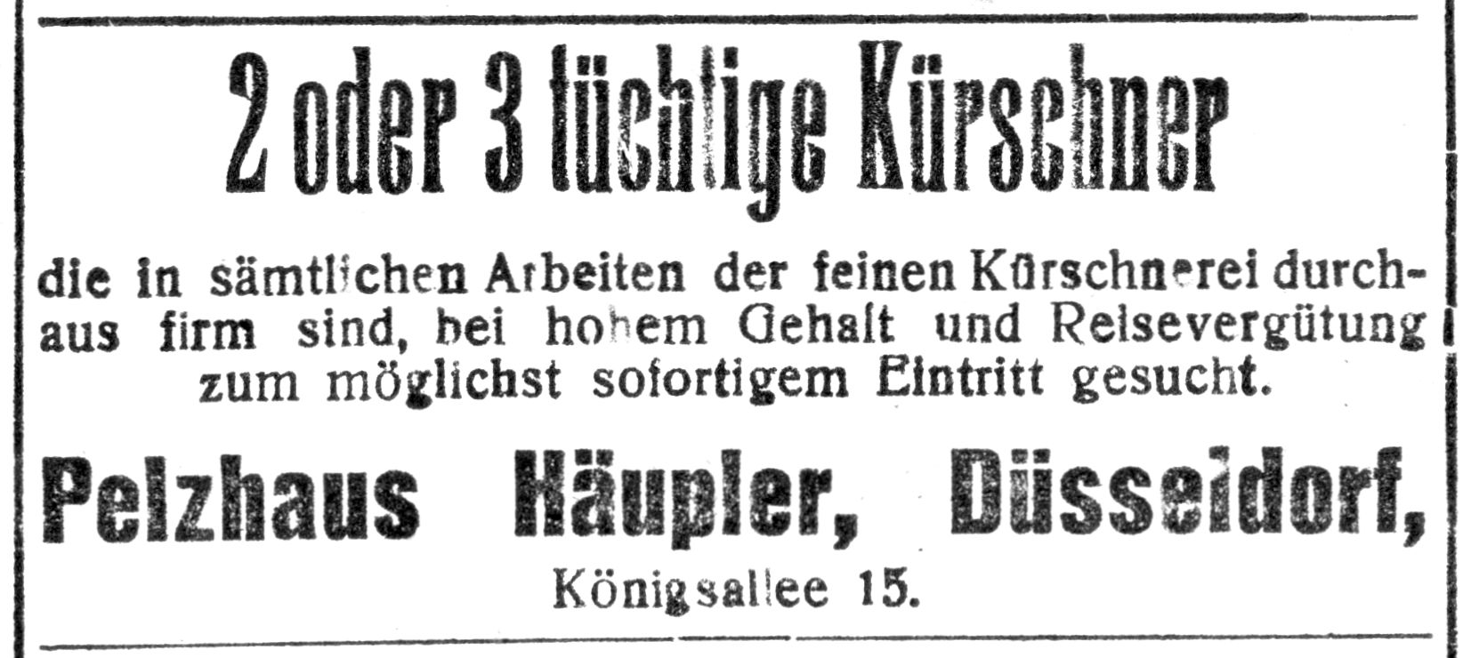 Pelzhaus Häupler, Düsseldorf, Königsallee 15, sucht Kürschner, Anzeige 1922. 2 oder 3 Kürschner die in sämtlichen Arbeiten der feinen Kürschnerei durch aus firm sind, bei hohem Gehalt und Reisevergütung zum möglichst sofortigen Eintritt gesucht.